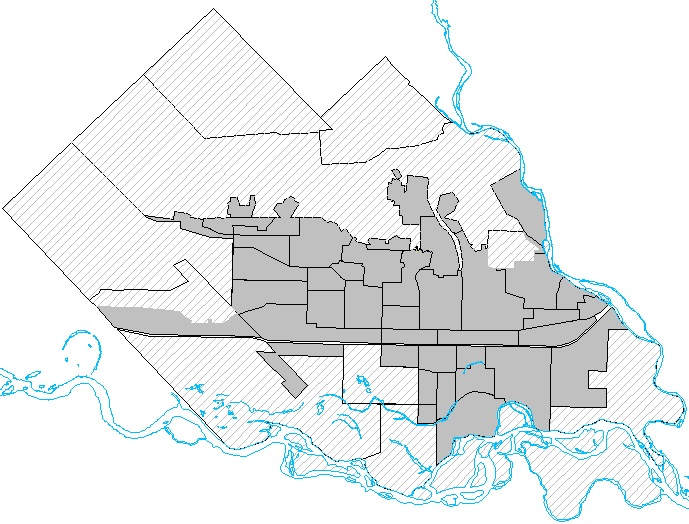 Plano de la ciudad de Neuquén con división administrativa. Referencias: Gris: barrios de alta densidad de población. Rayado, áreas sin población, rurales, con baja densidad o especiales (industrial, militar) Fuente: Municipalidad de Neuquen. Sistema de Información Territorial Urbano de Neuquén (SITUN). Mapa Interactivo y [Plano de Barrios oficiales